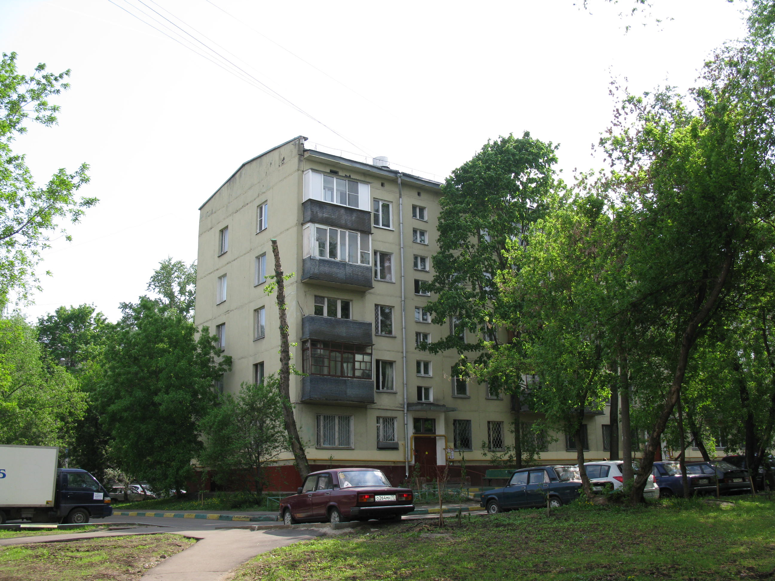 Первый микрорайон Перовского района. Москва.